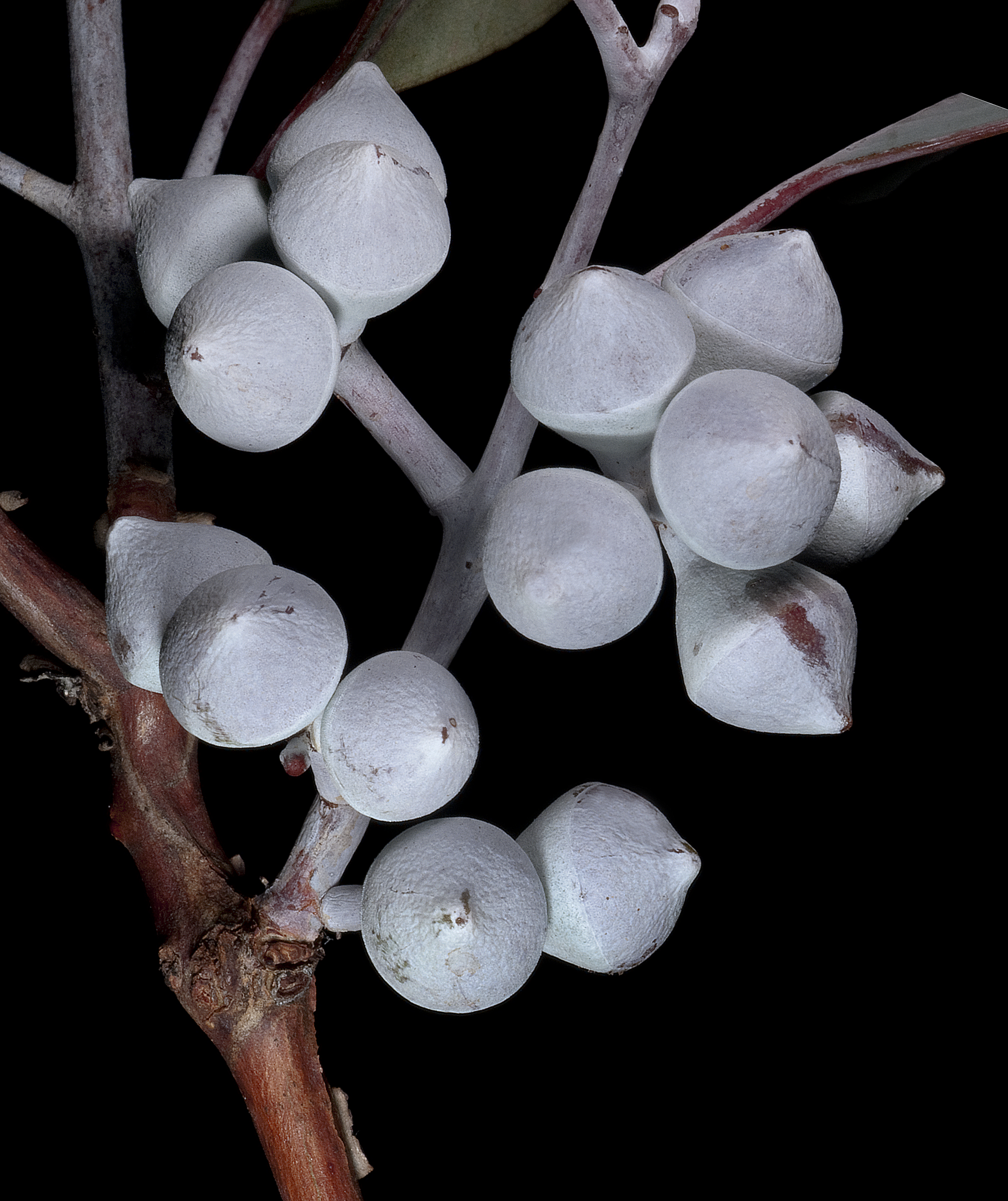 KRT3972